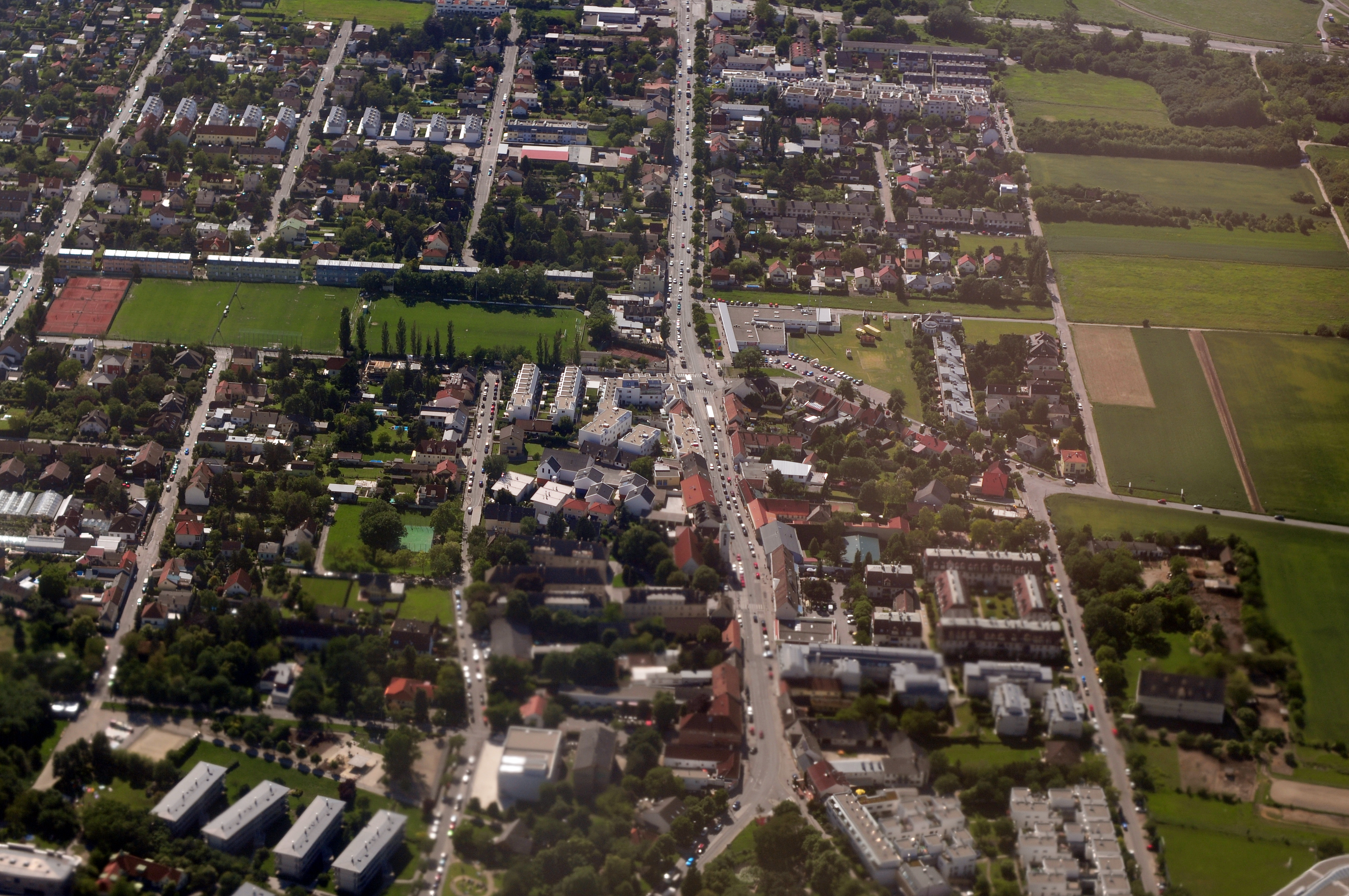 Landeanflug Wien-Schwechat